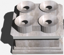 Flakturm Bauart 2